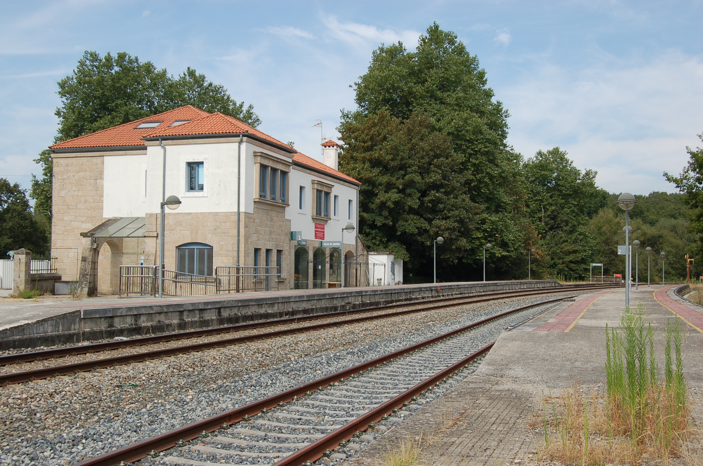 Estación de ferrocarril de Vilar de Barrio